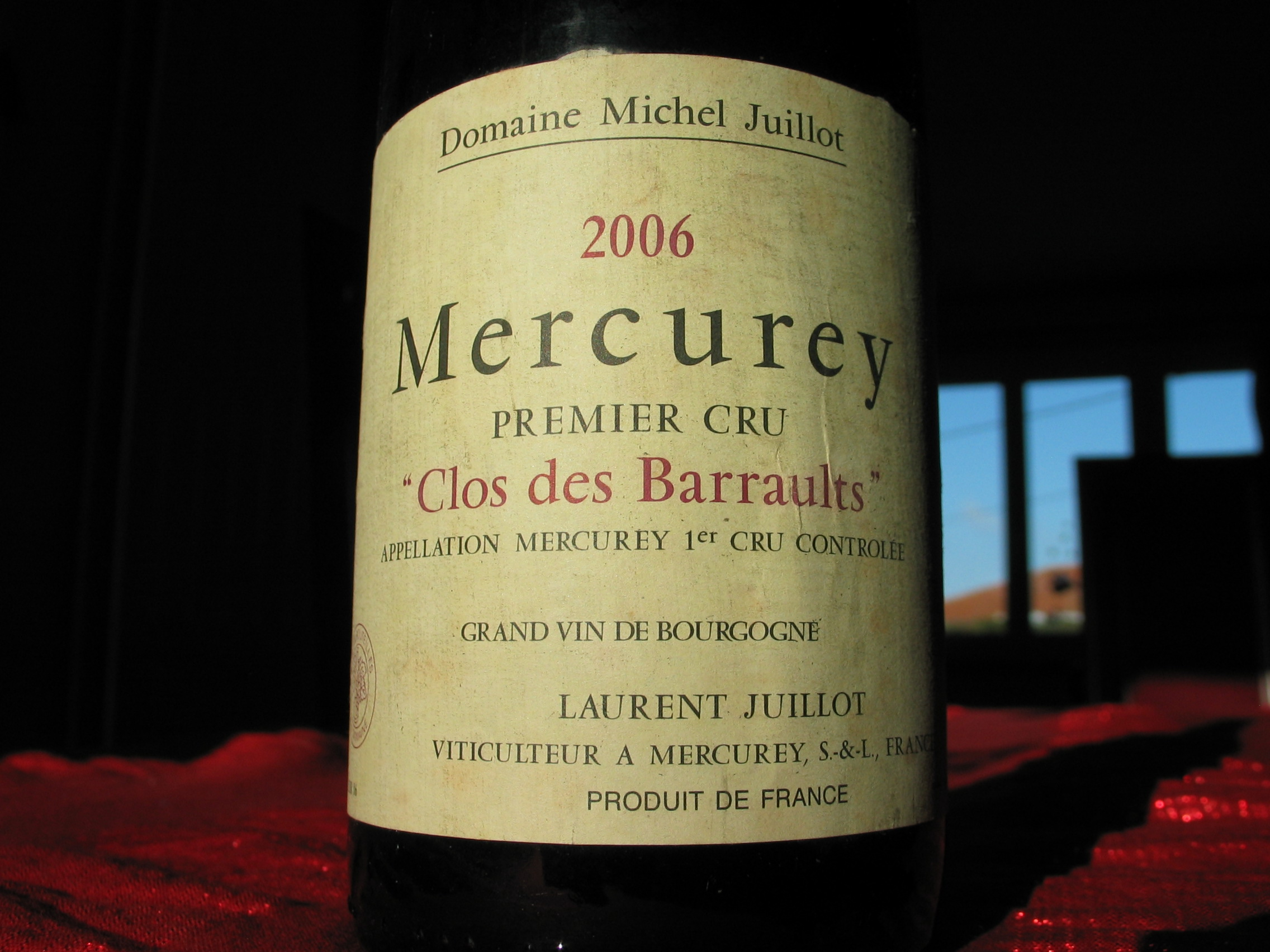 Mercurey premier cru "Clos des Barraults" (vin de Bourgogne, côte chalonnaise).